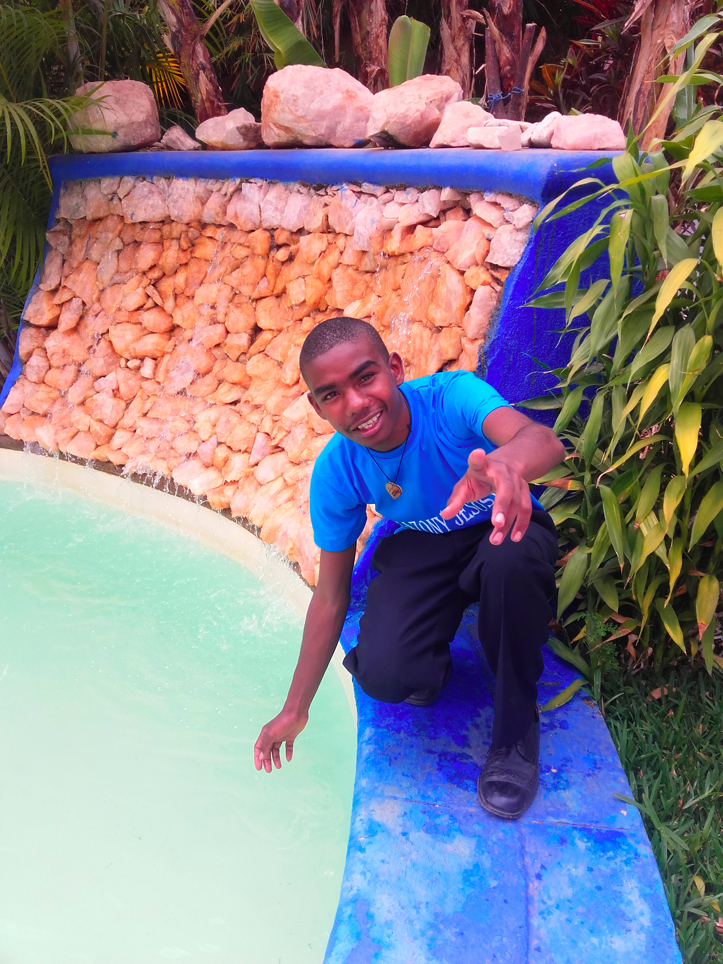 Malagasy: Image de Tonio